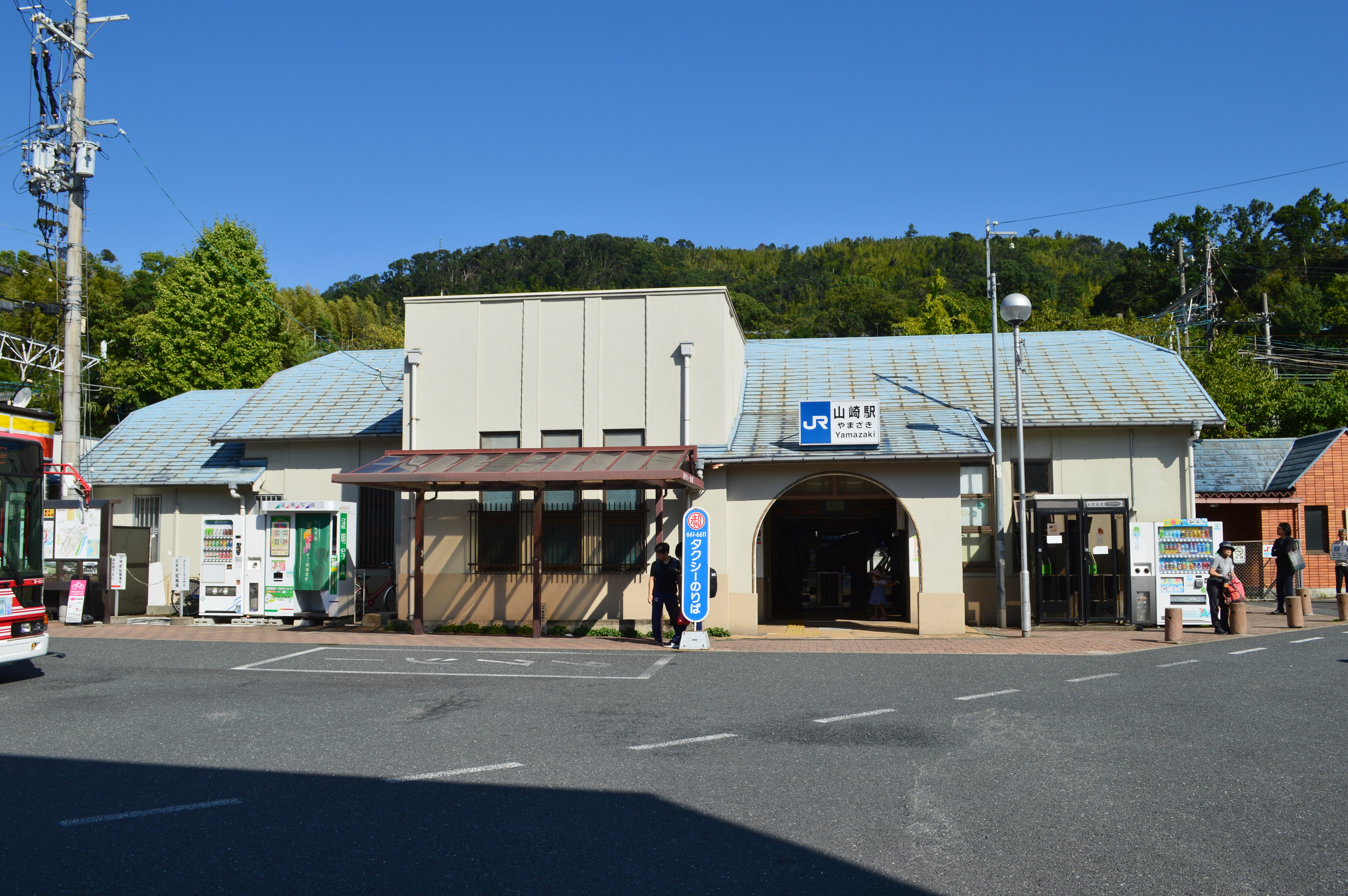 山崎駅 (京都府) 駅舎